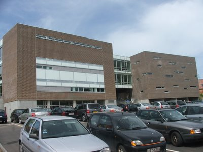 Skive Bibliotek